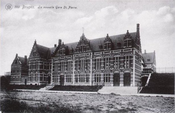 Vroeger stationsgebouw Brugge-Sint-Pieters